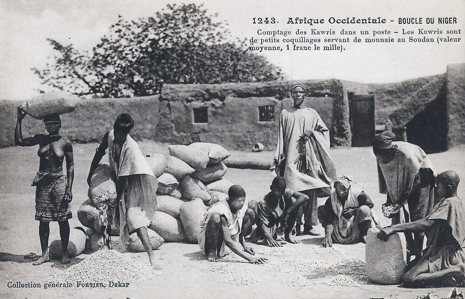 Compatge des kawris dans un poste. Les kawris sont de petis coquillages servant de monnaie au Soudan (valeur moyenne 1 franc le mille). Afrique Occidentale. Boucle du Niger.